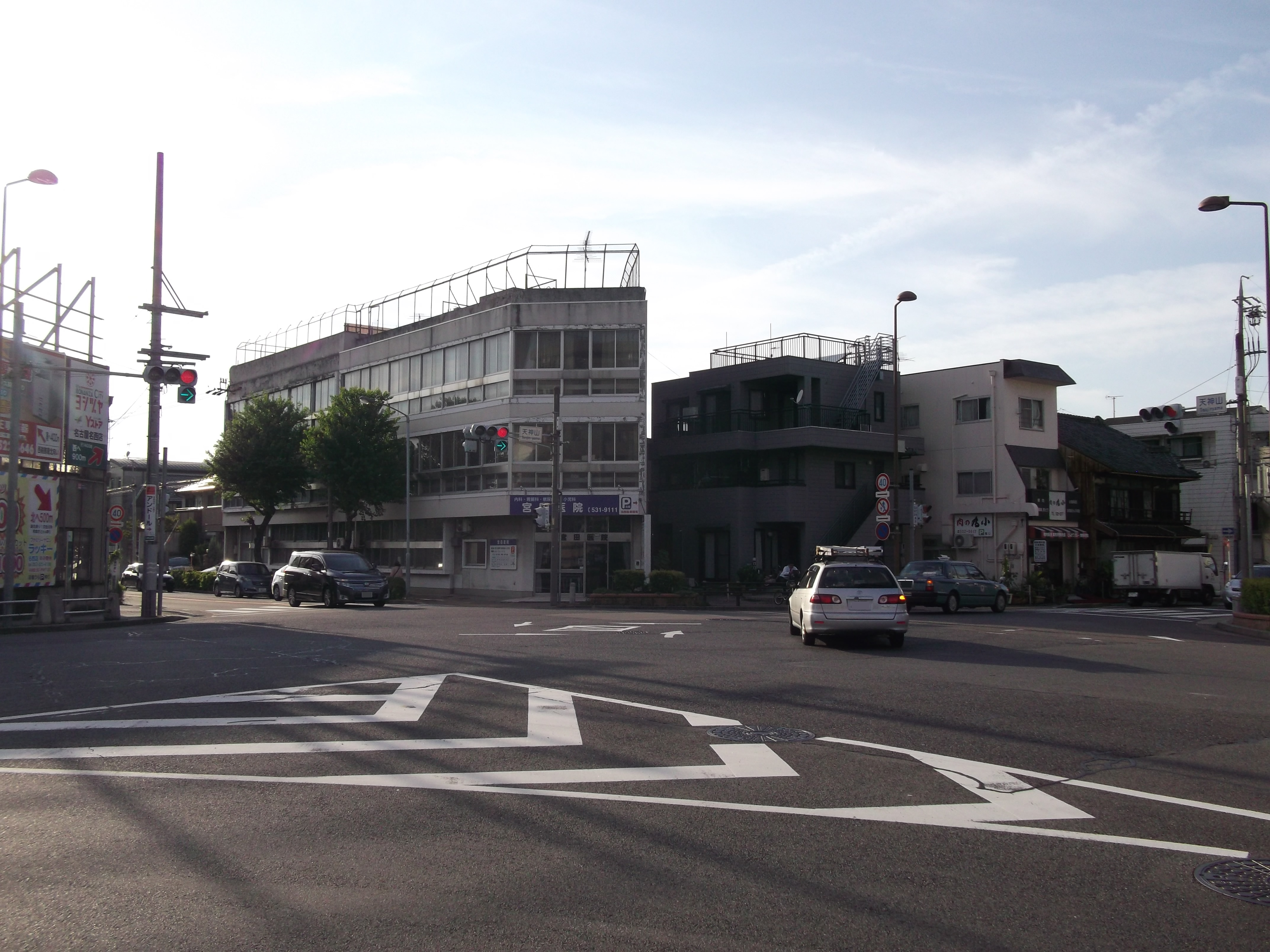 名古屋市西区天神山交差点南東側から写す